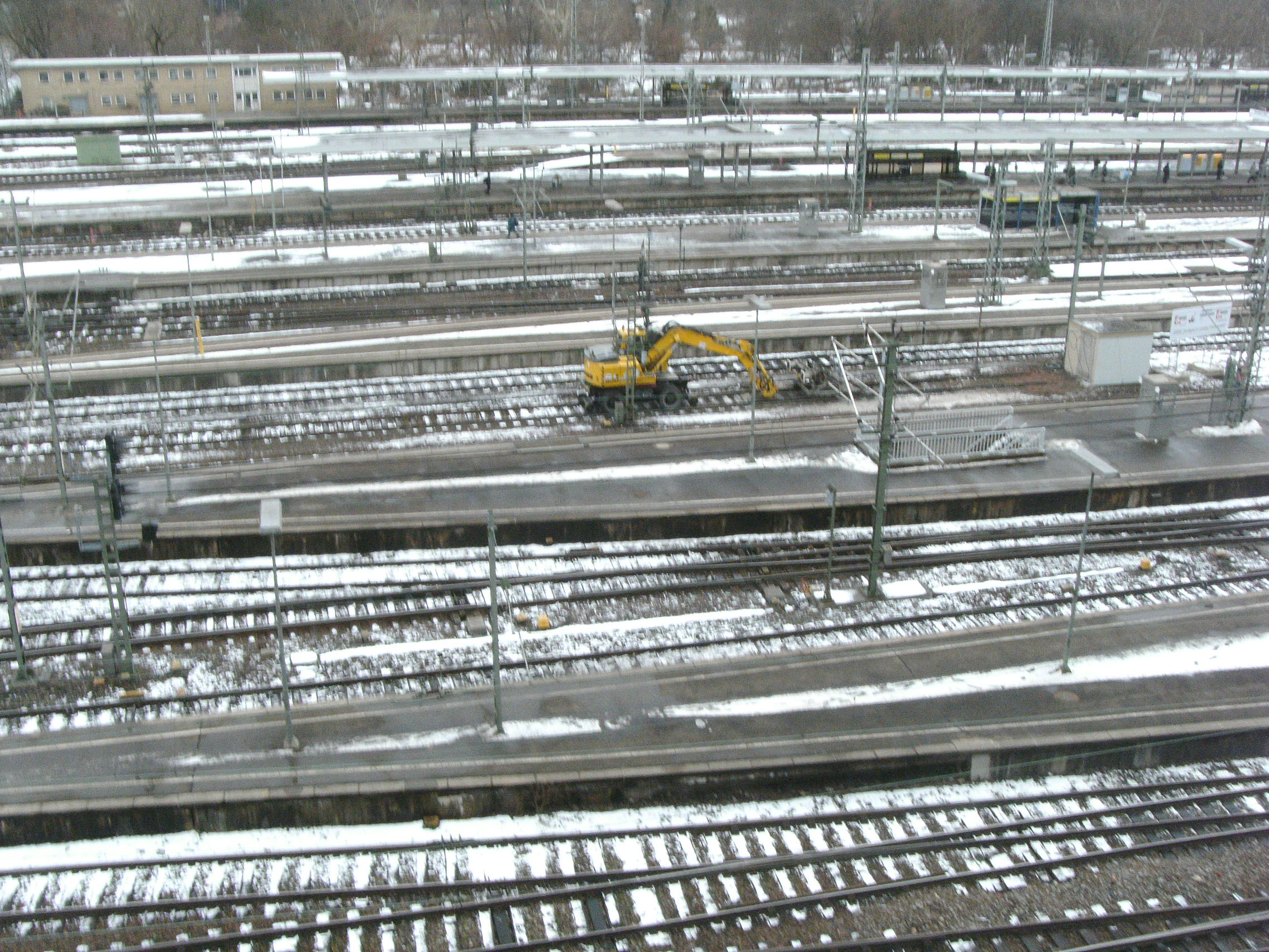 Nach dem 'Ersten Spatenstich' zu S21